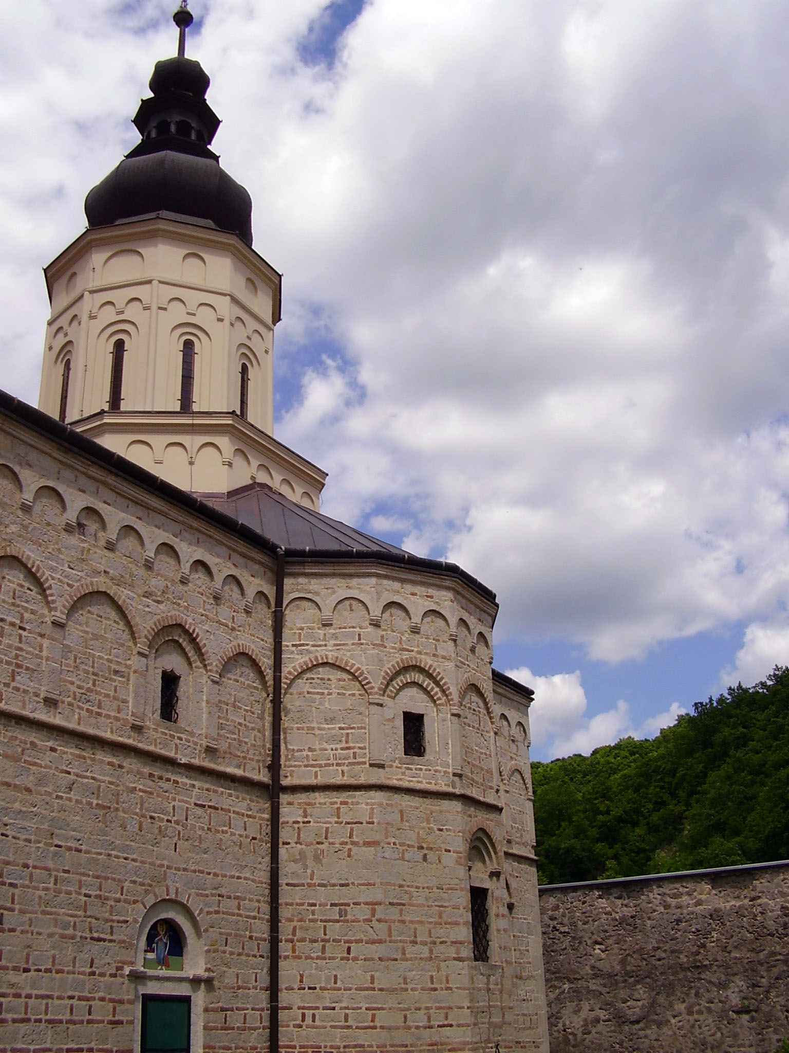 Jazak monastery, Fruška Gora in Serbia